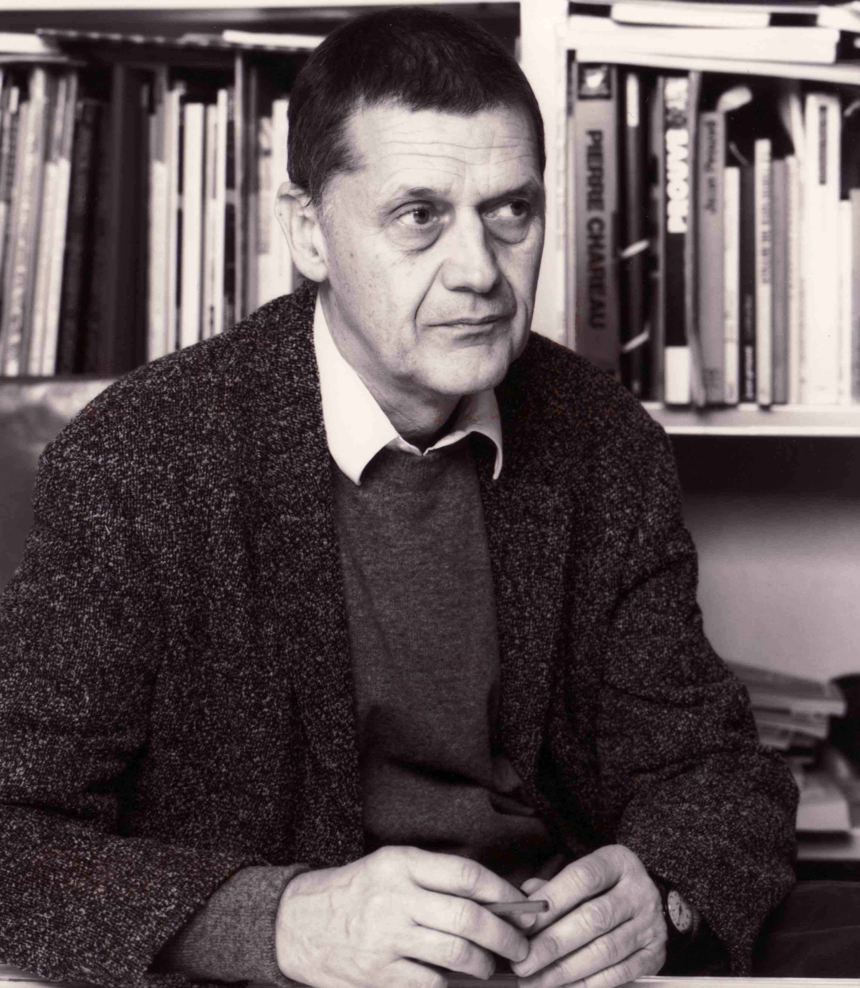 Porträt Helmut Richter Angaben korrekt. --Brigitte (Diskussion) 16:51, 16. Mär. 2013 (CET)